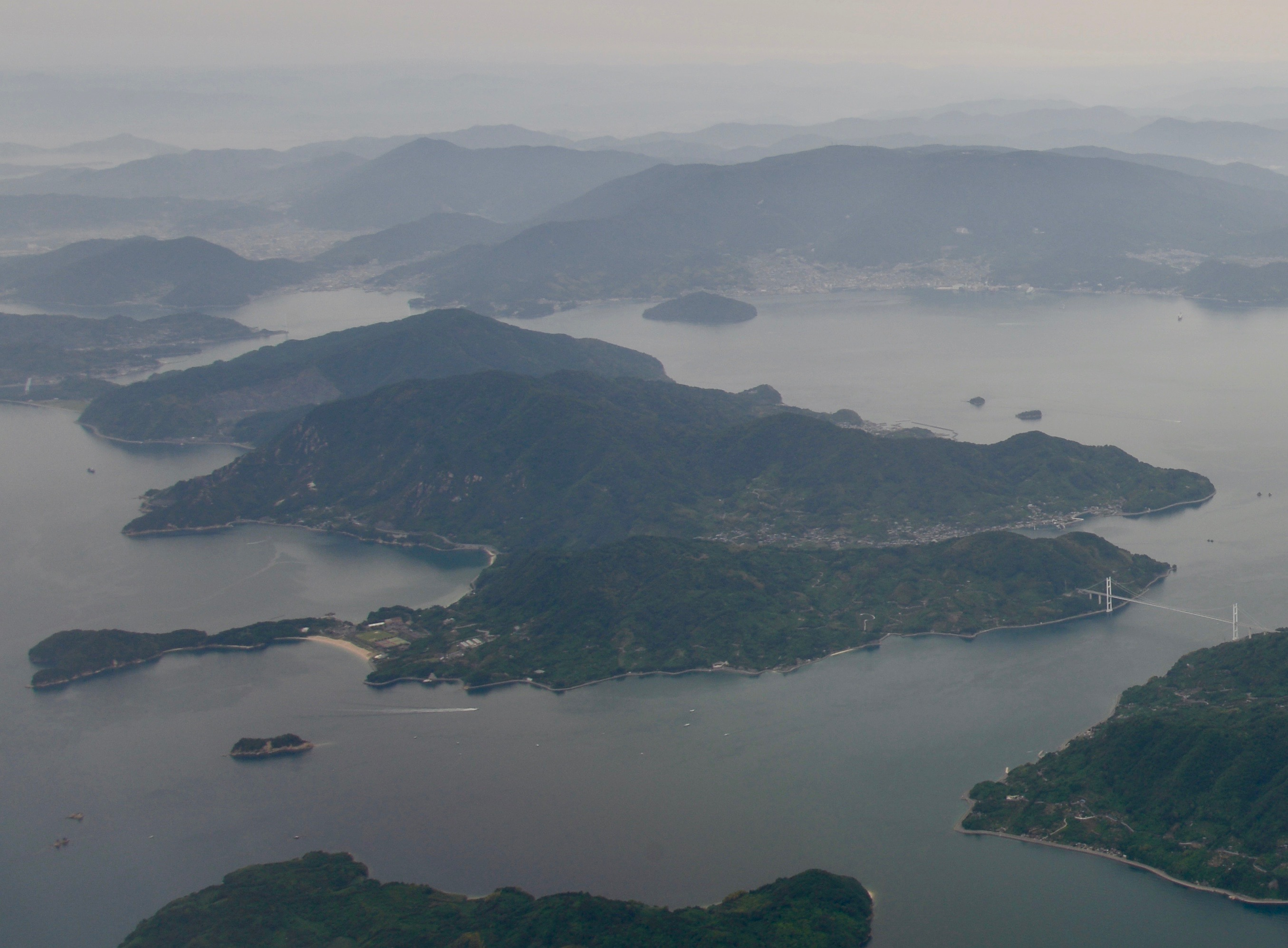 広島県呉市上蒲刈島 松山空港へ向かう機内にて撮影